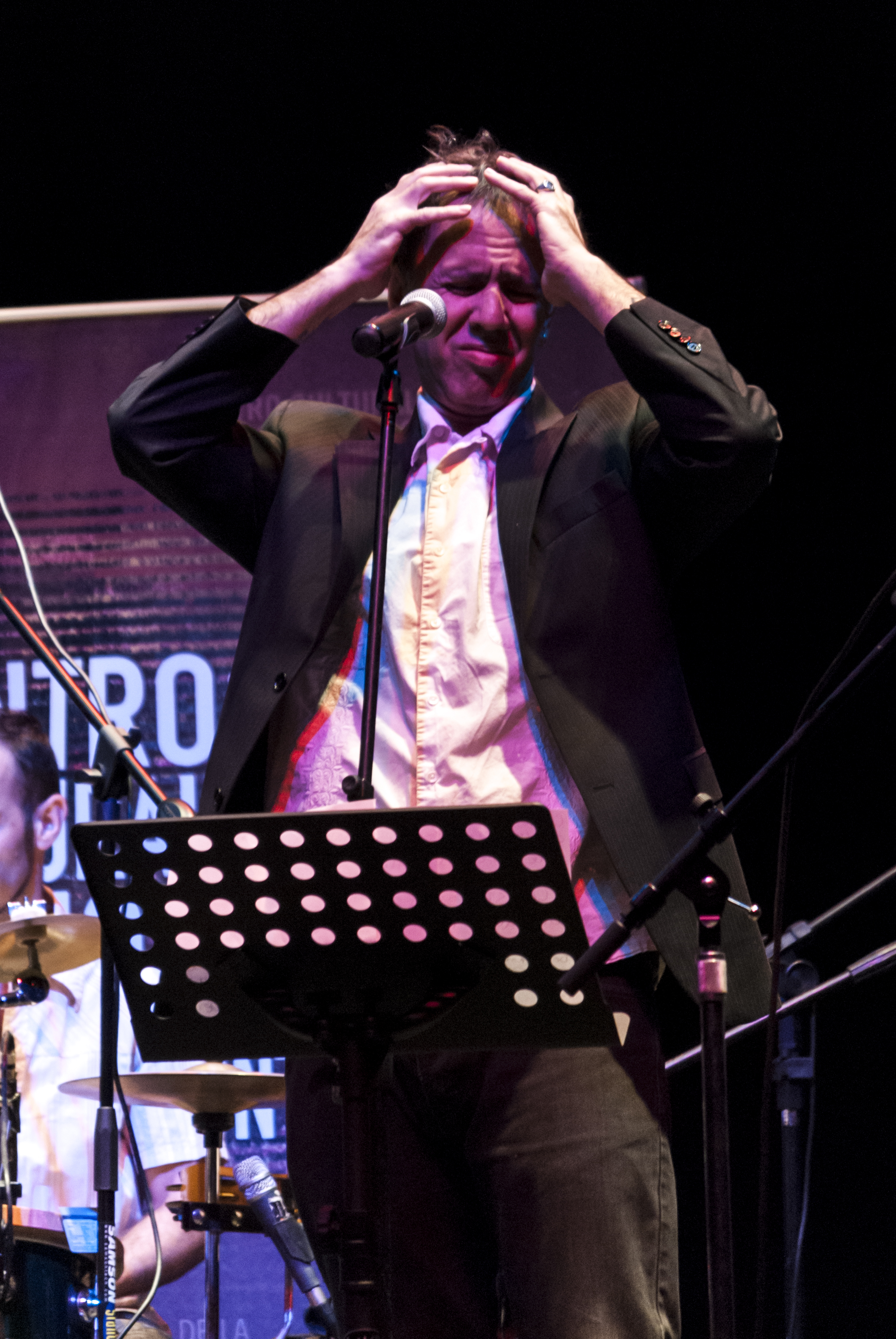 Marcelo "Cuino" Scornik en 2013.